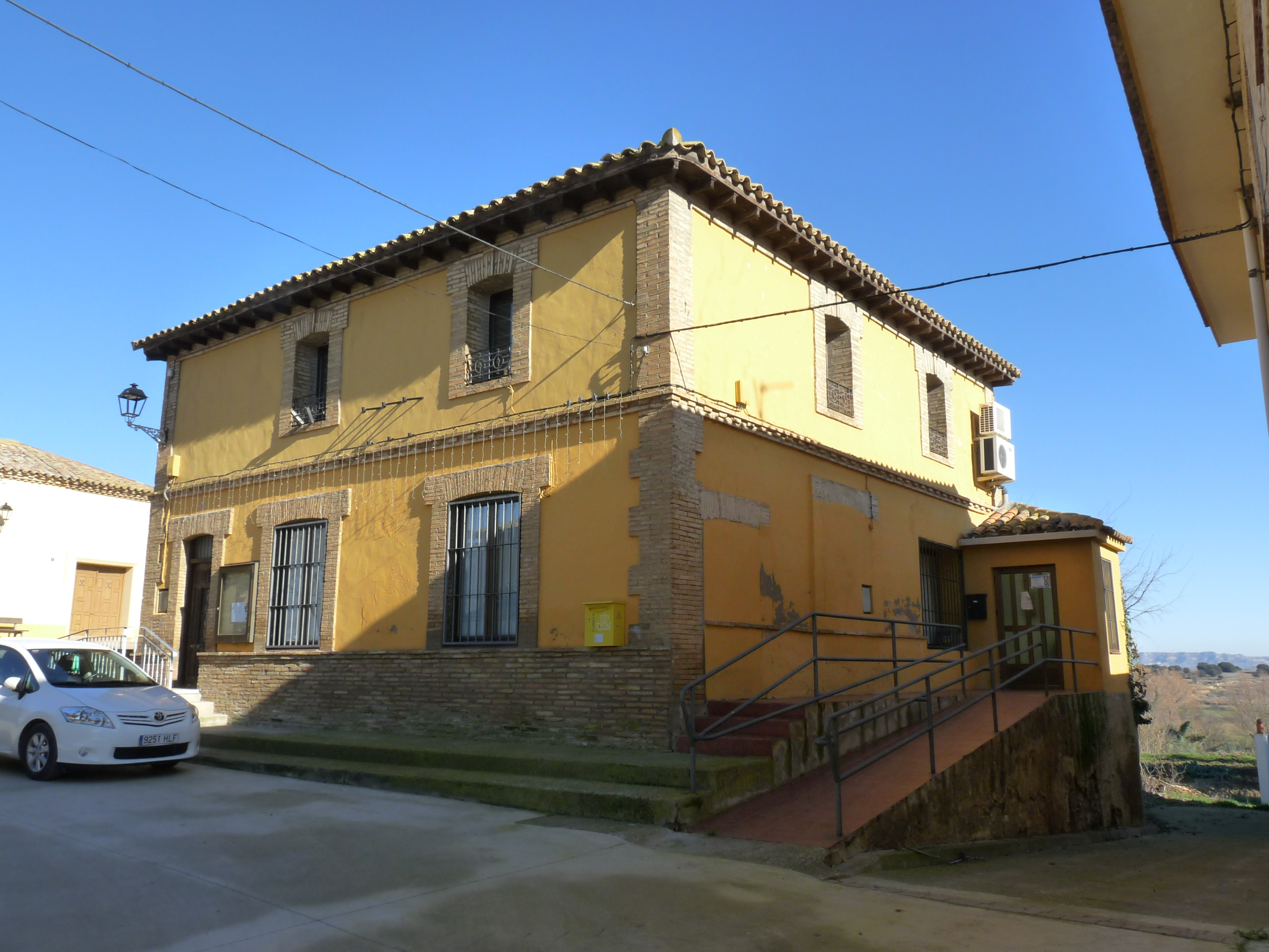 Torres de Barbués - Iglesia de San Pedro (s. XVII)